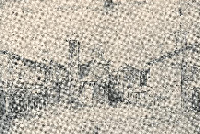 La vecchia Chiesa di San Vittore al Corpo, con l'abside al posto dell'attuale ingresso.